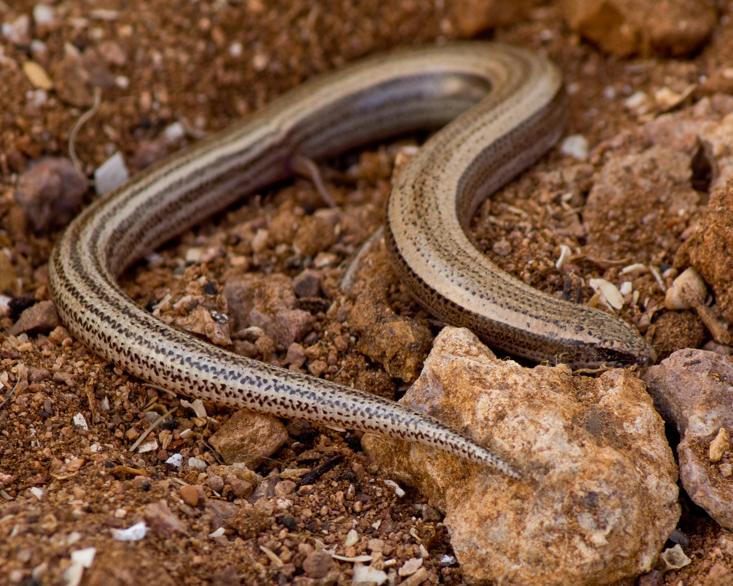 eslizon de oran en las islas chafarinas